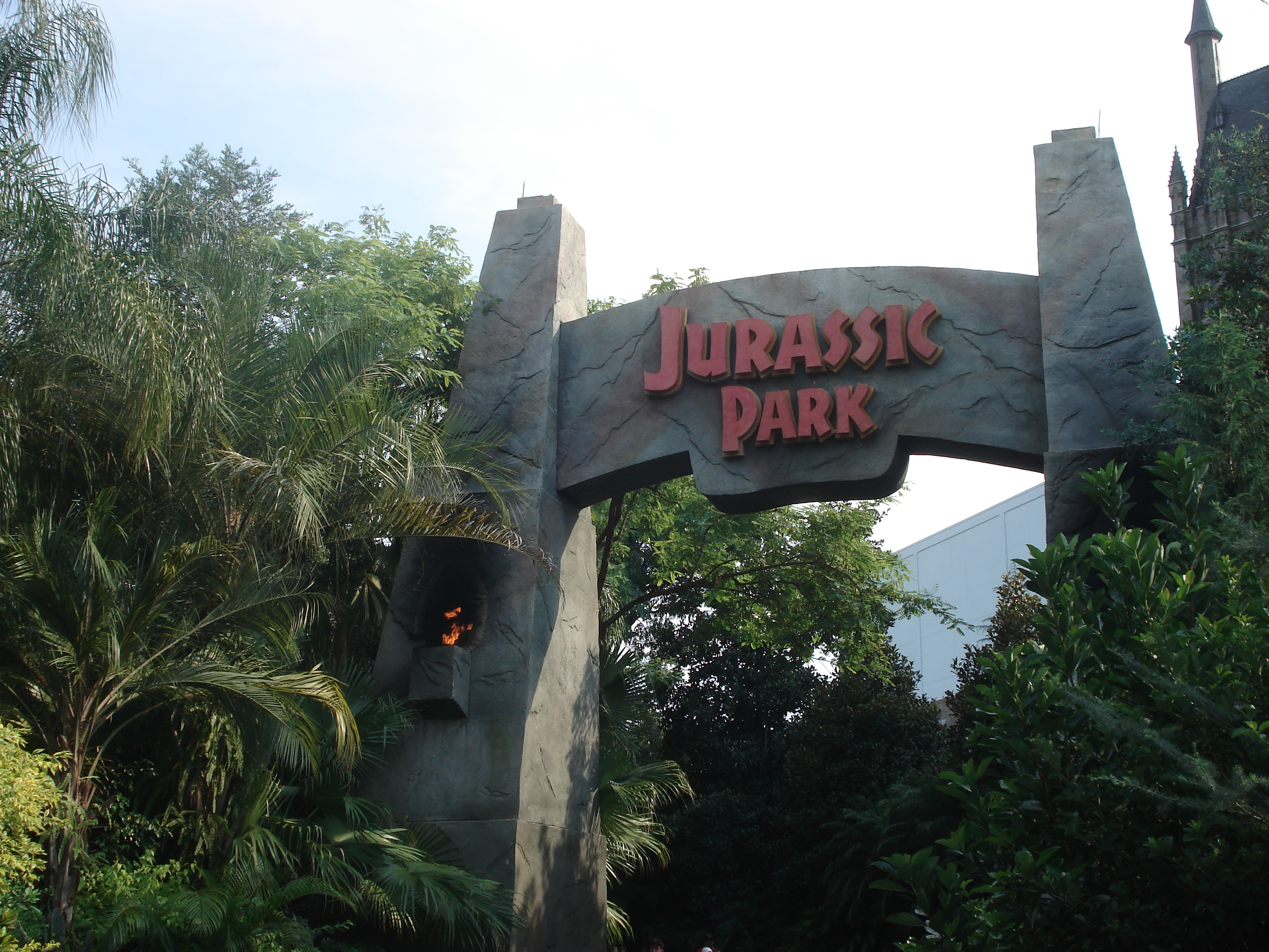 Universal Orlando